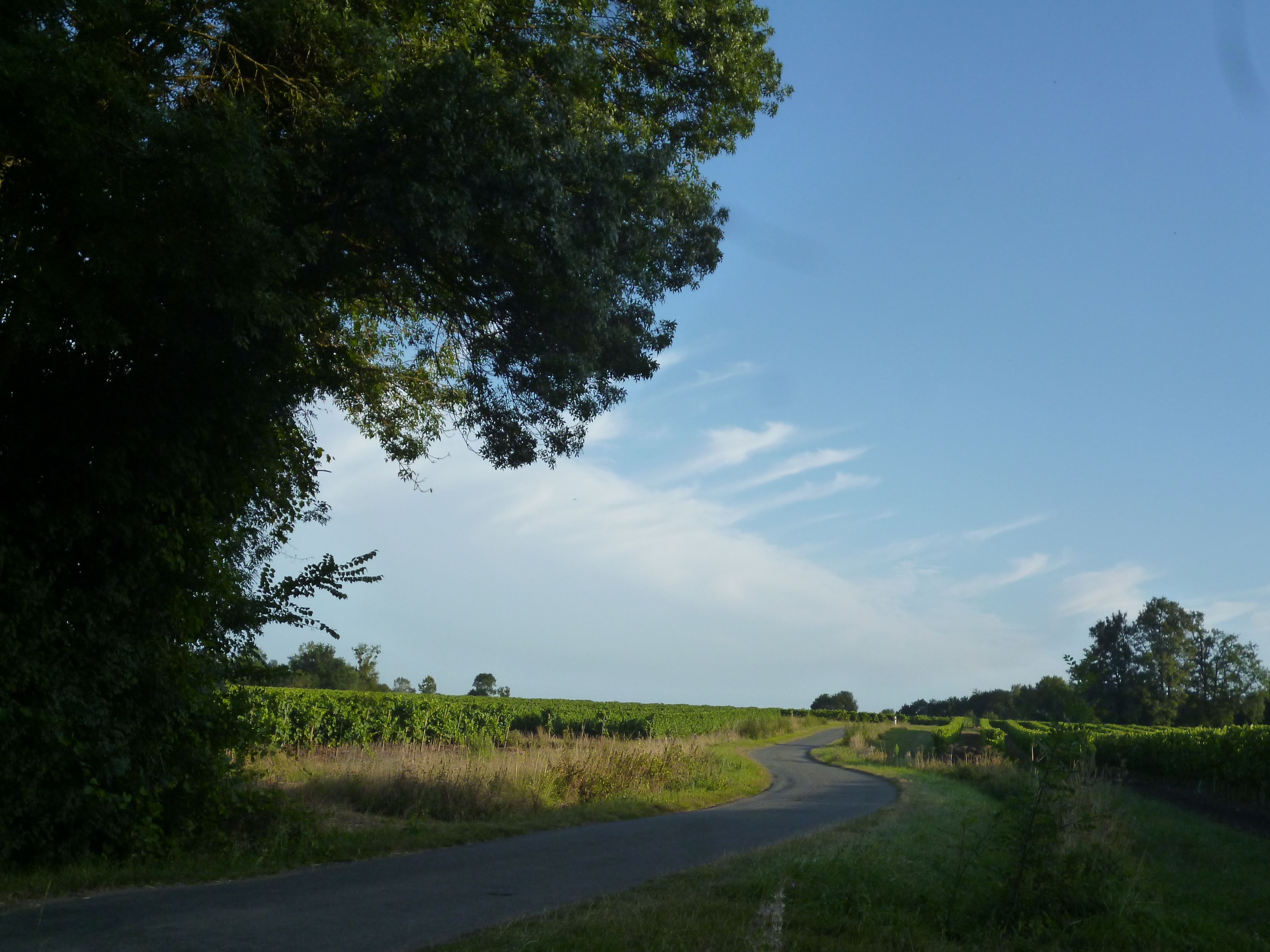 Petite route et vigne à Migron.